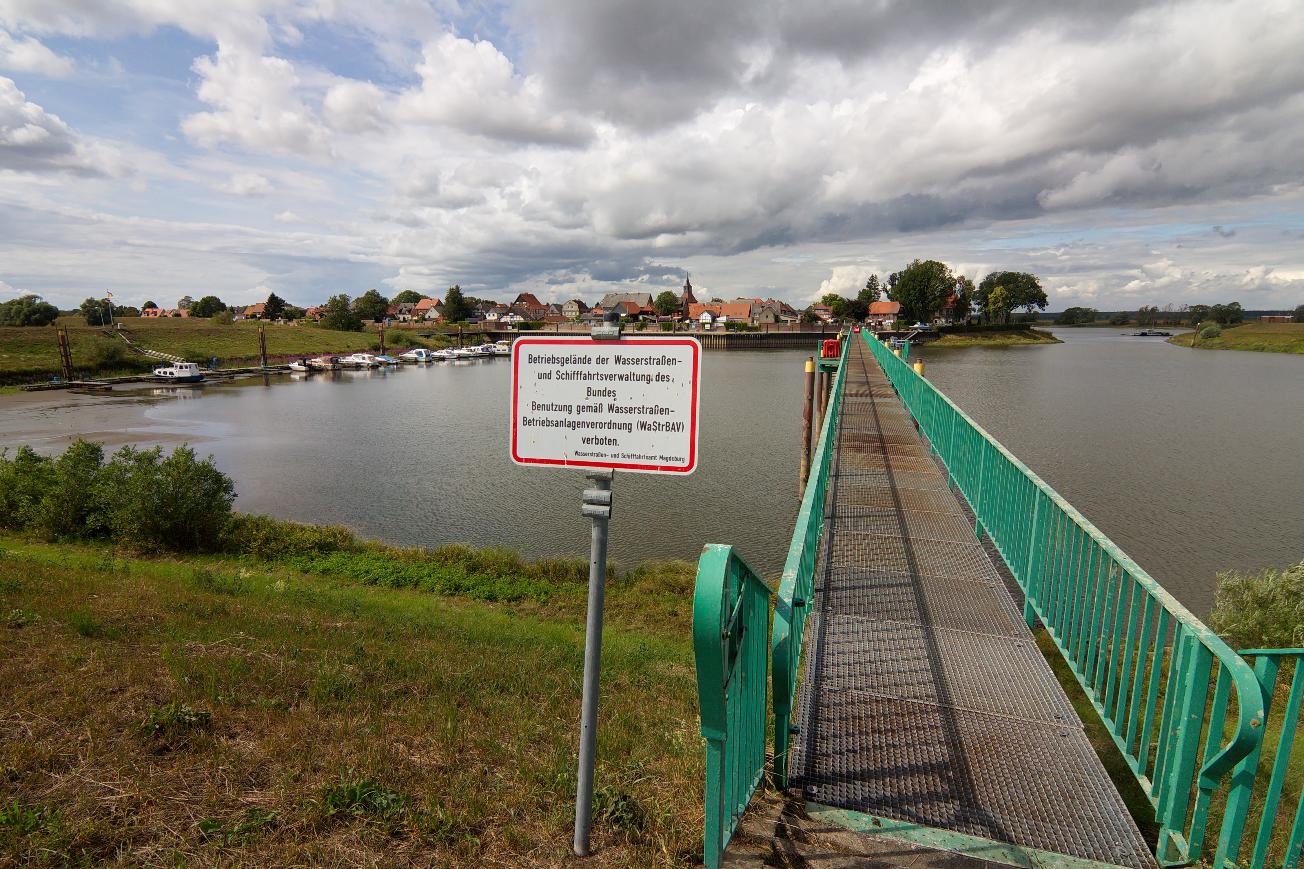 Schutzhafen in Schnackenburg, Niedersachsen, Deutschland